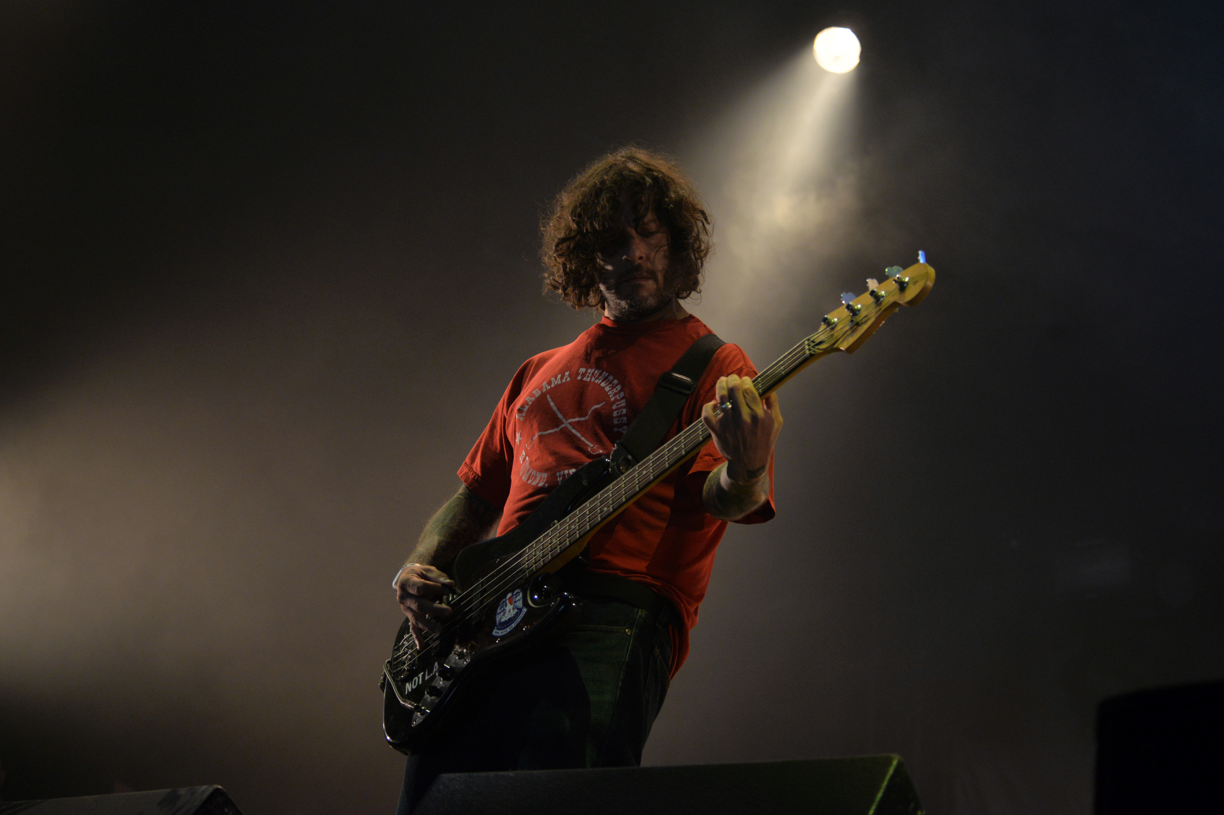 Concert du groupe américain EyeHateGod, Hellfest 2018.